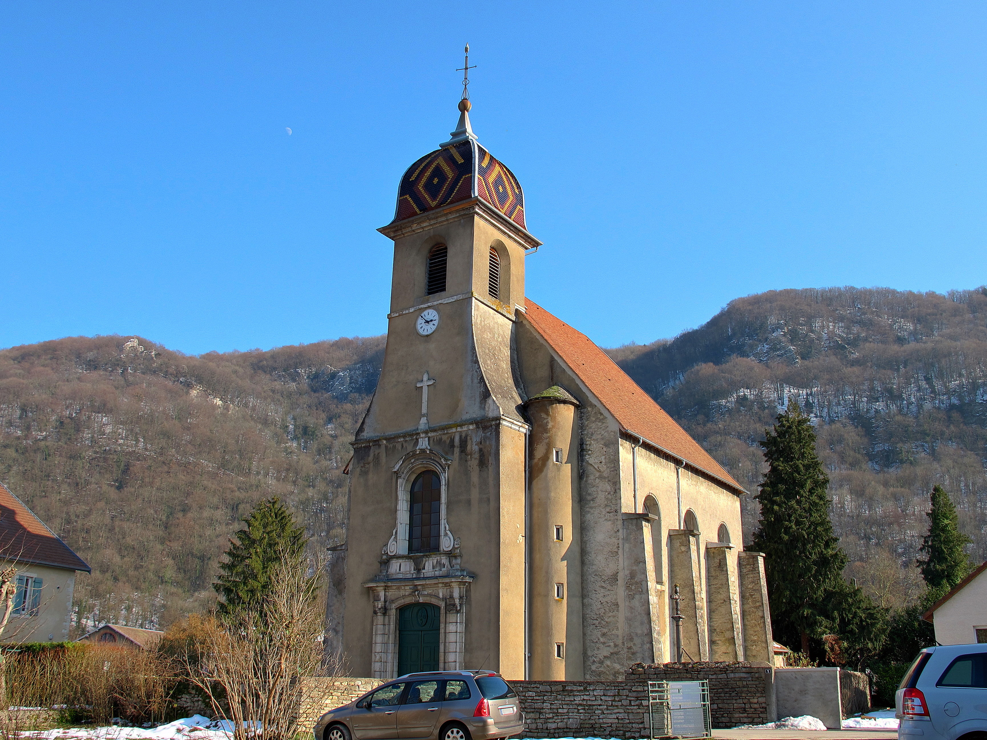 Inscrit aux monuments historiques sous le numéro : PA00101637